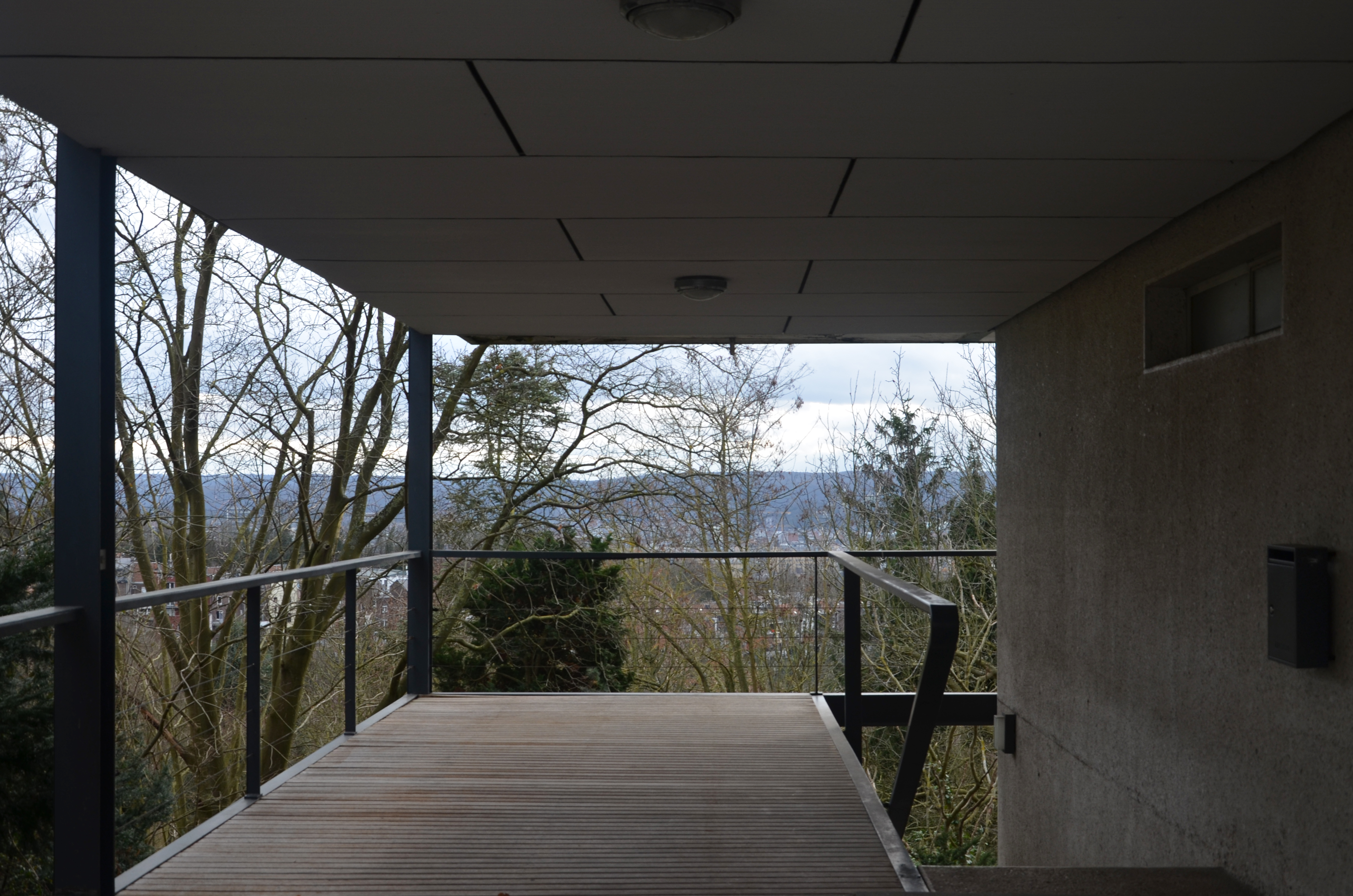 Photo de la maison Mozin depuis le porche d'entrée